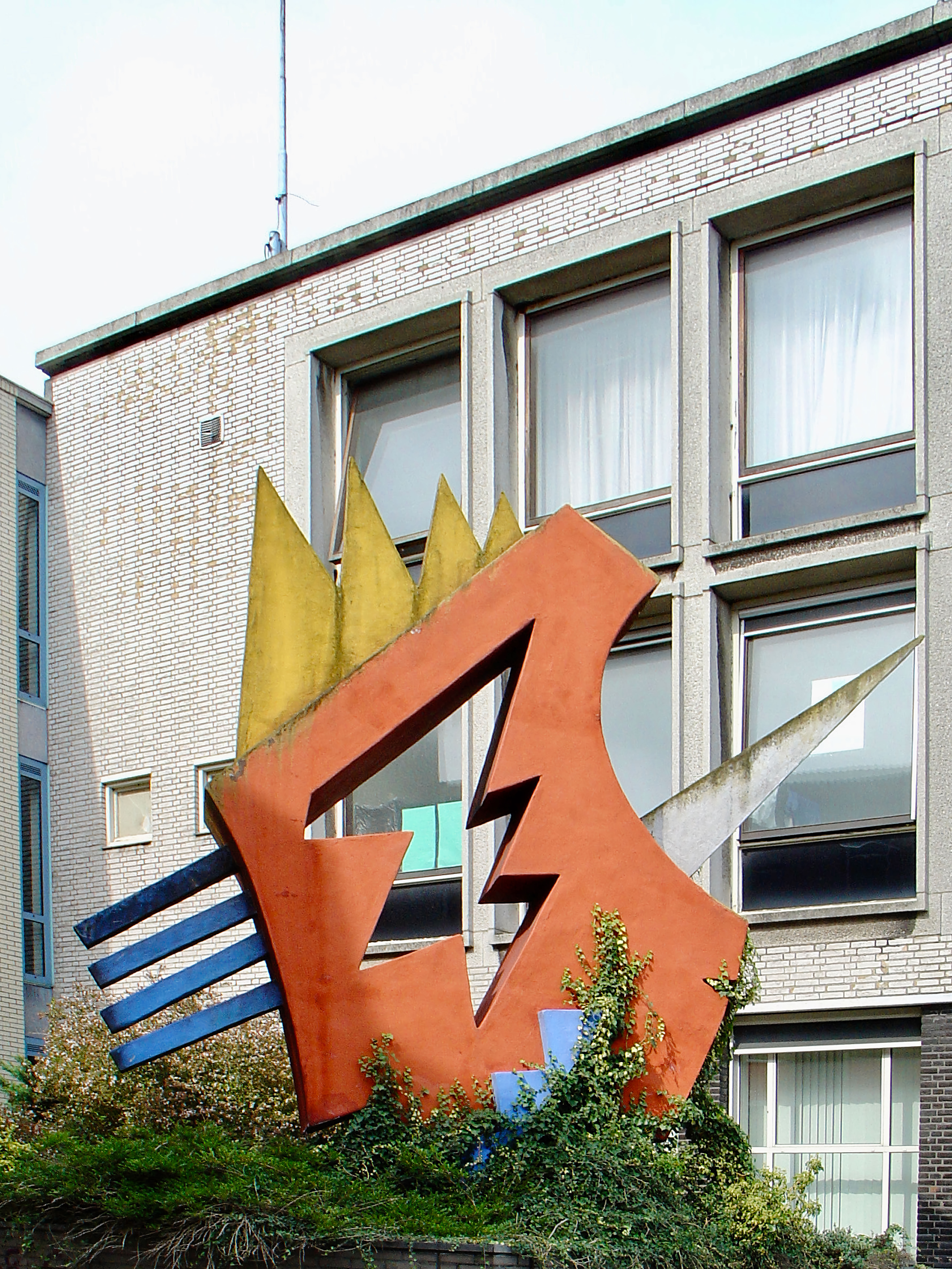 De zachtmoedige weerbaarheid (of de paradijsvogel) (ferro-cement, 1989) door Pim Leefsma - Houtmansgracht Gouda. De sculptuur is verwijderd in 2015